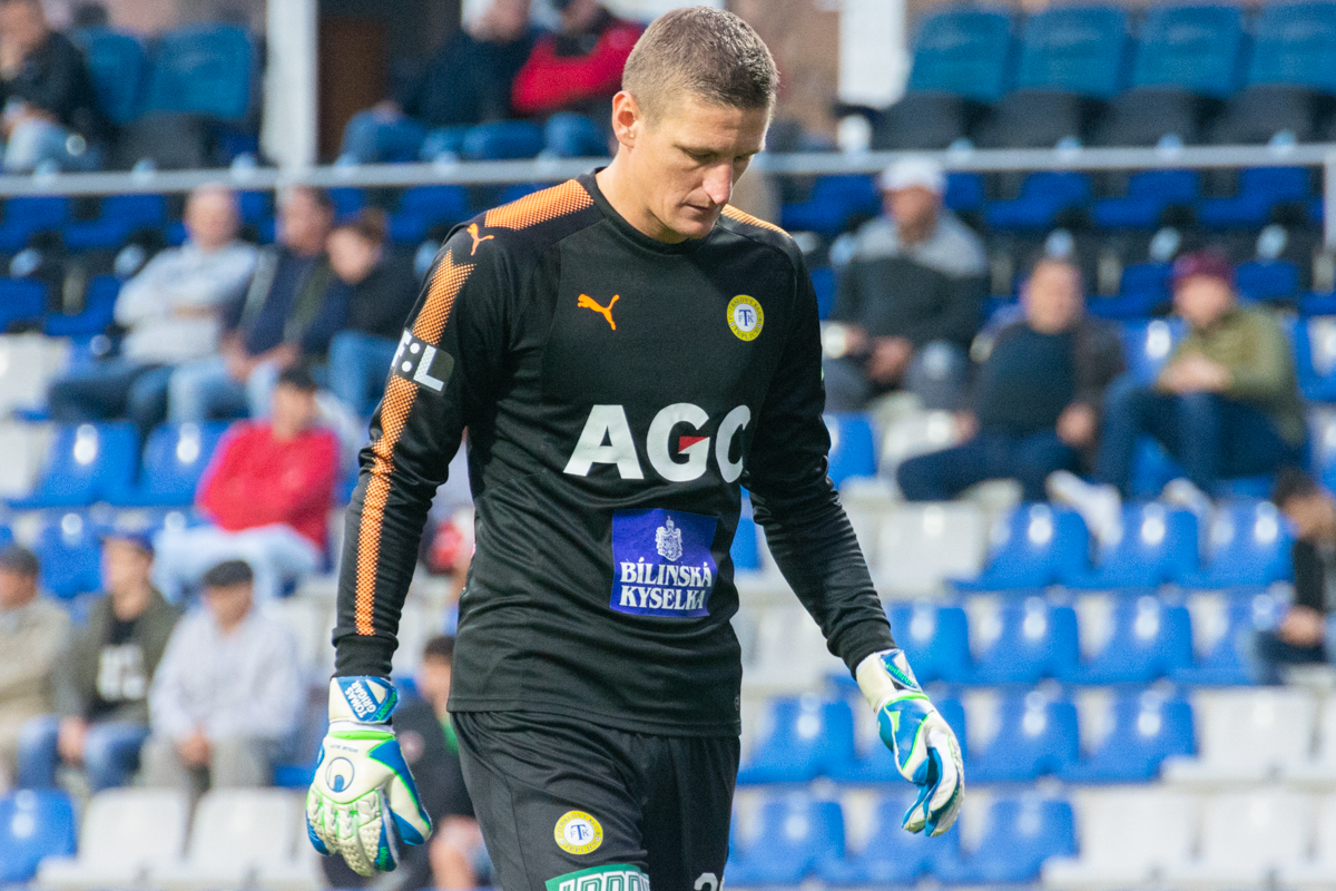 Tomáš Grigar vs FK Mladá Boleslav